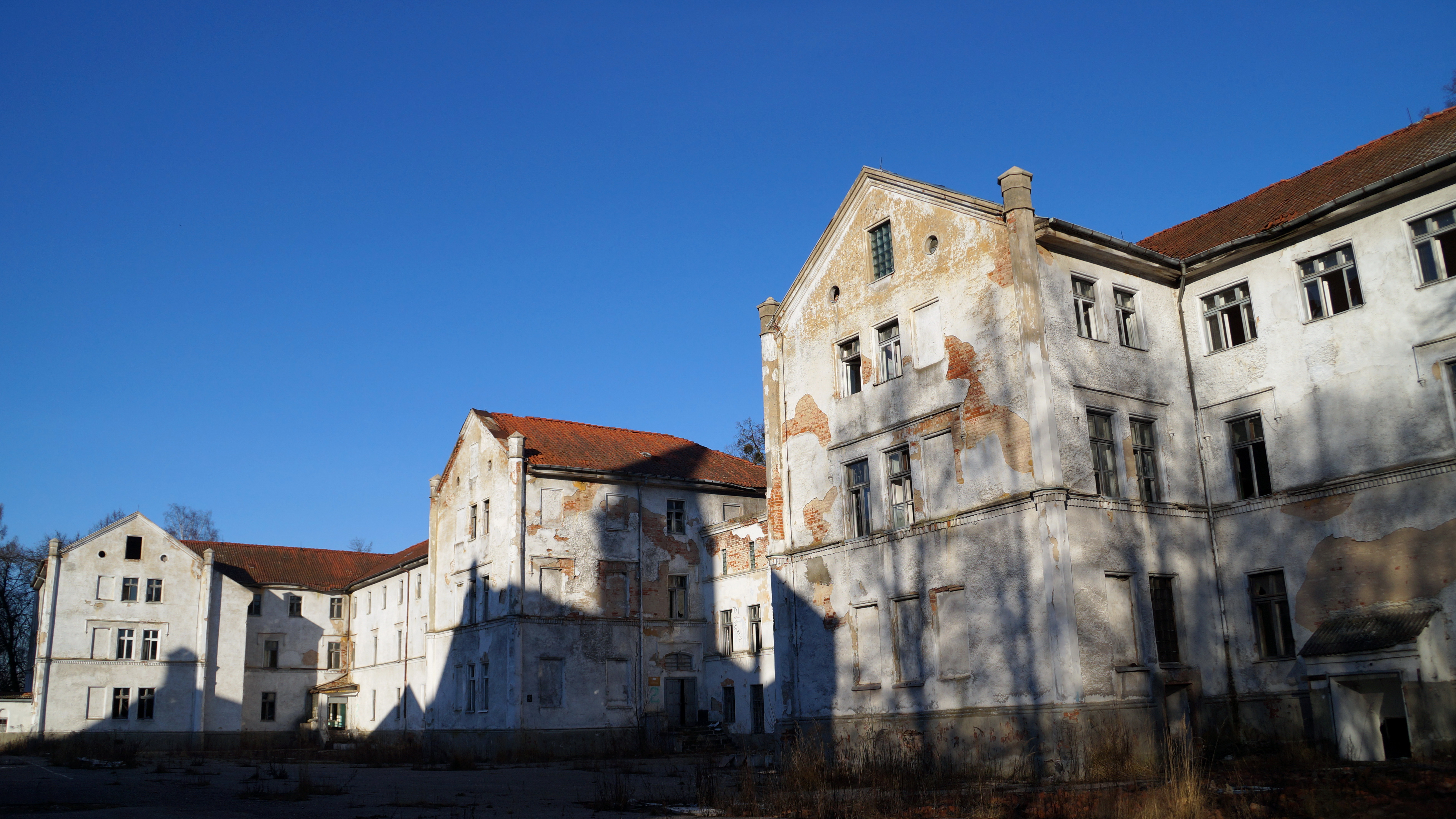 Комплекс зданий психиатрической больницы Алленберга: Знаменск, Гвардейский район, Калининградская область